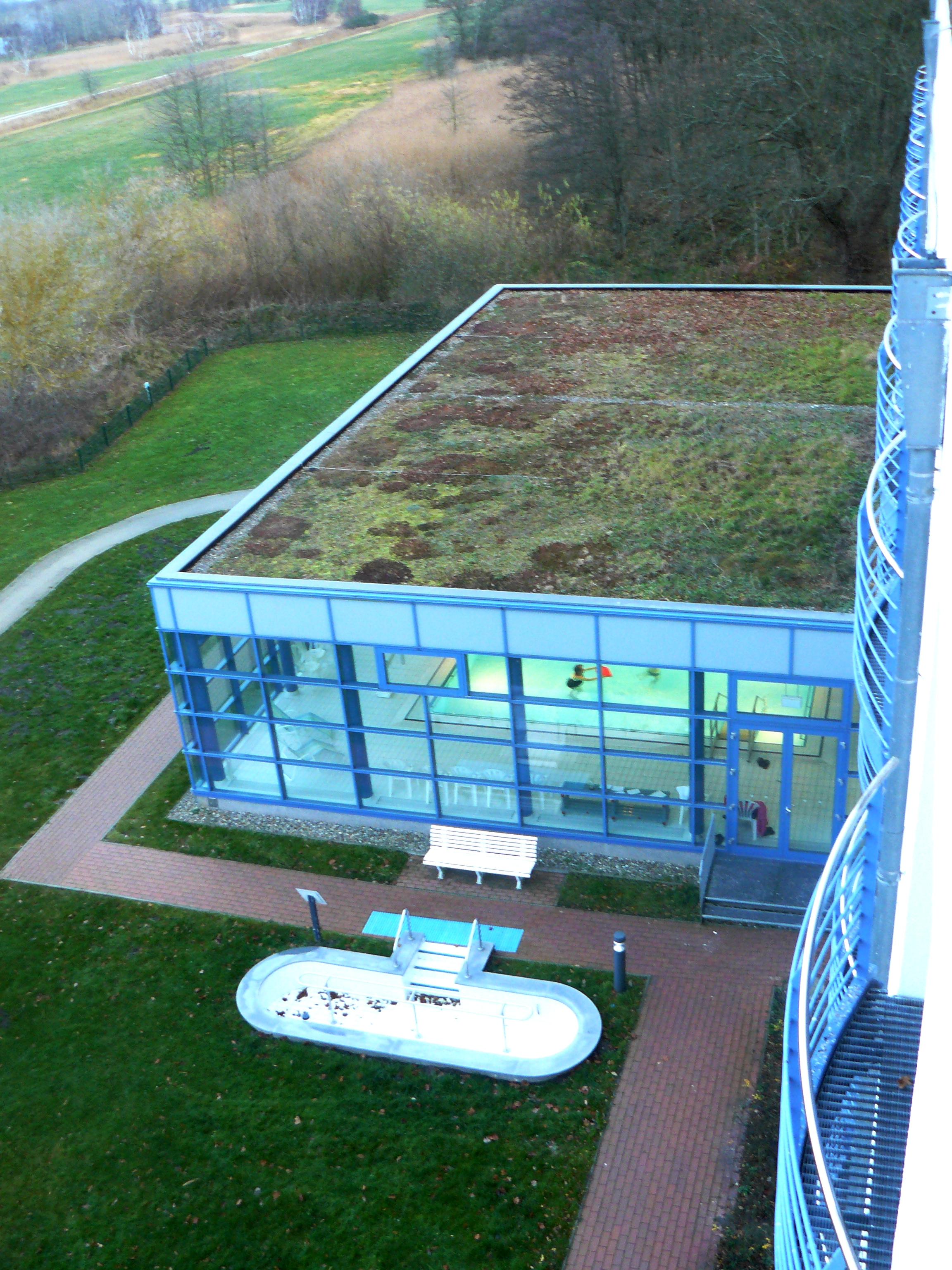 Rehaklinik Ahrenshoop